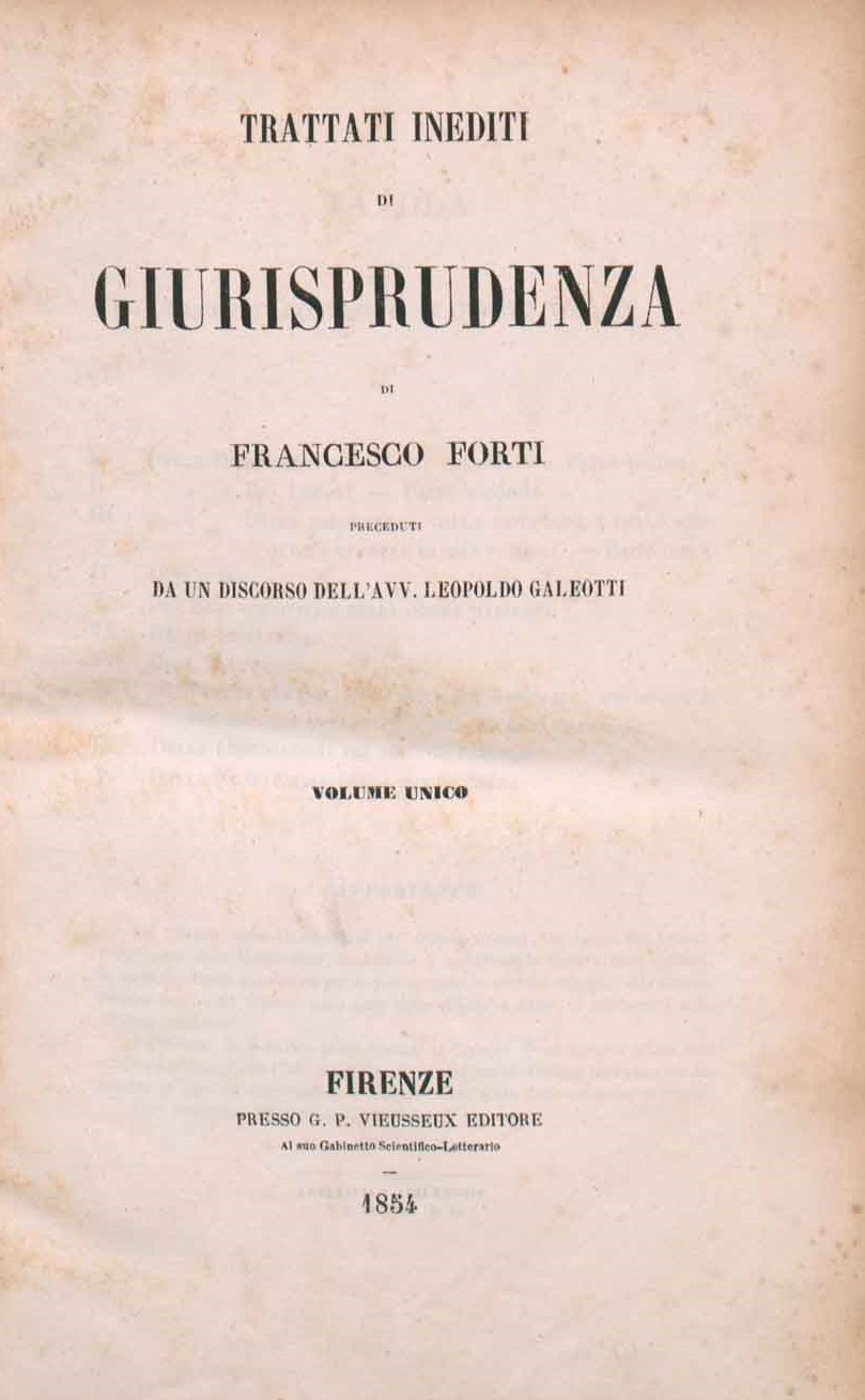 Frontespizio